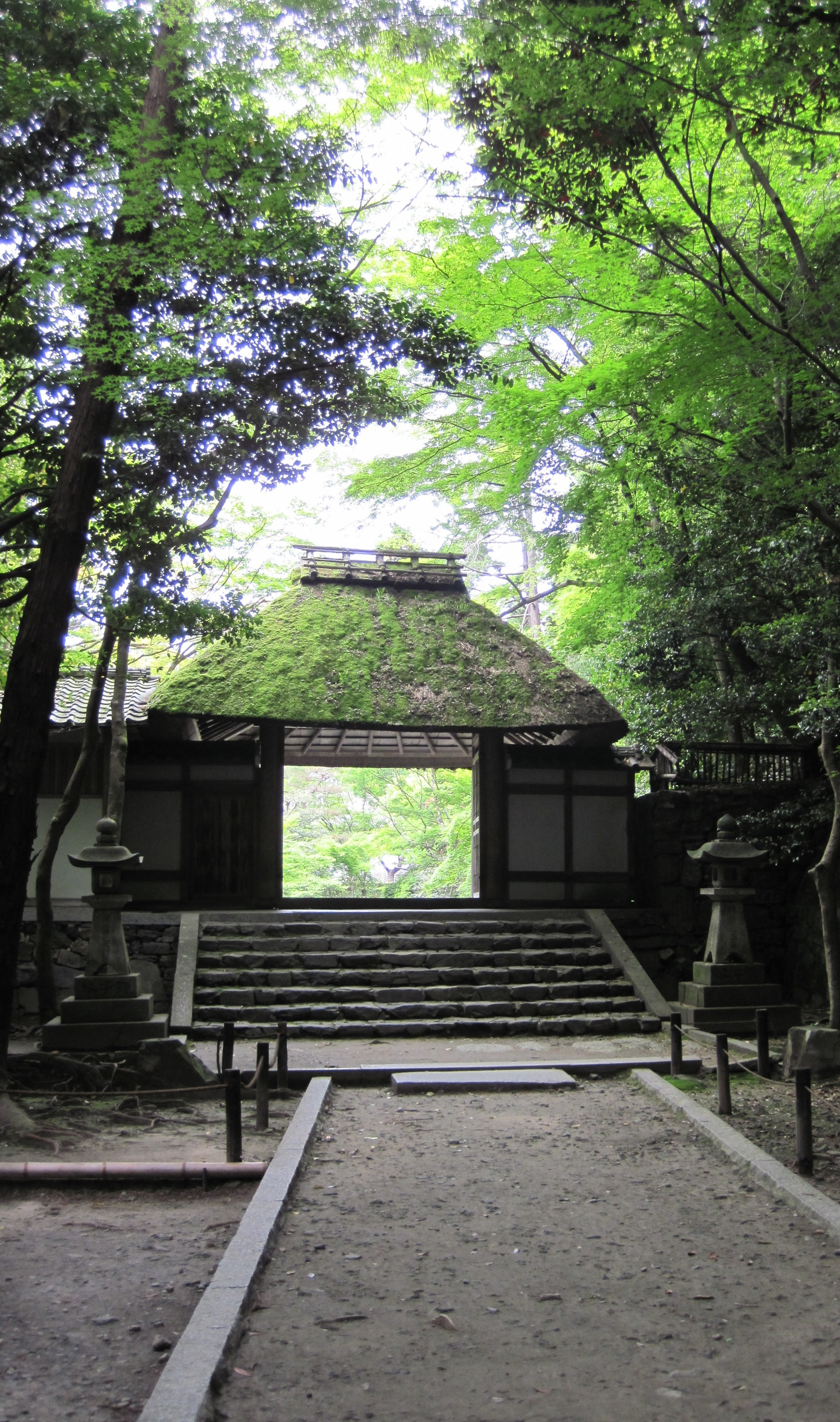 法然院